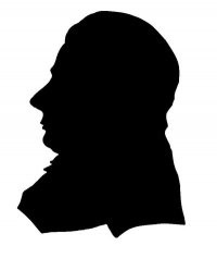 Sivert Aarflot (1759–1817), norsk avismann.